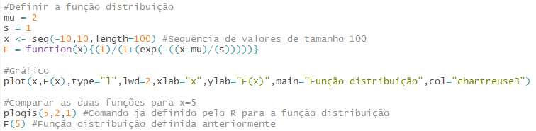 Script da FD